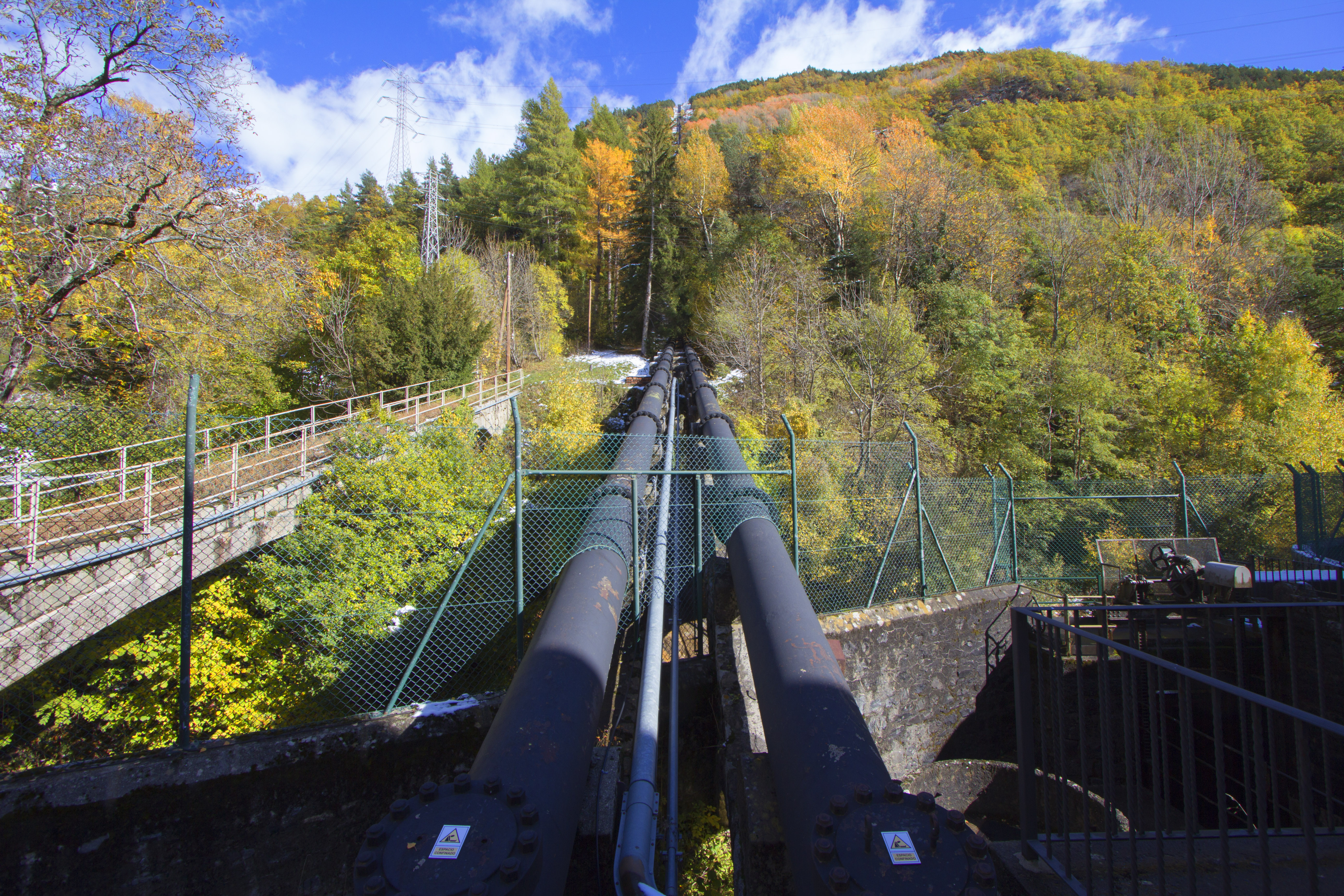 Canonades forçades de la CH Capdella (Pallars Jussà)